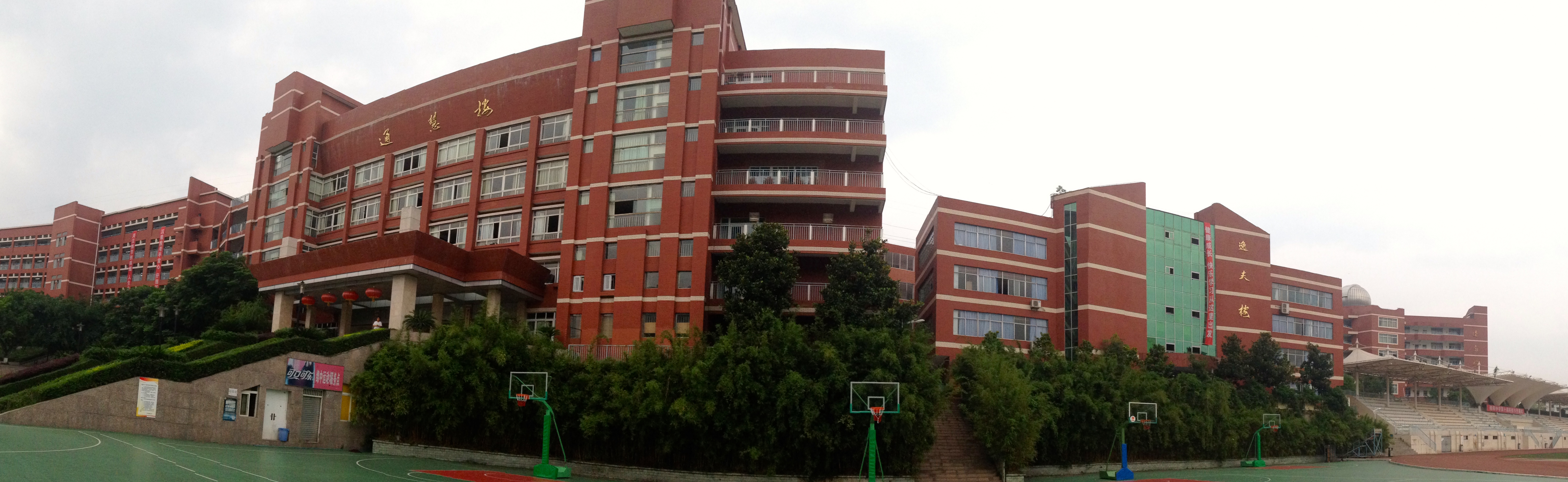 Fucheng, Mianyang, Sichuan, China